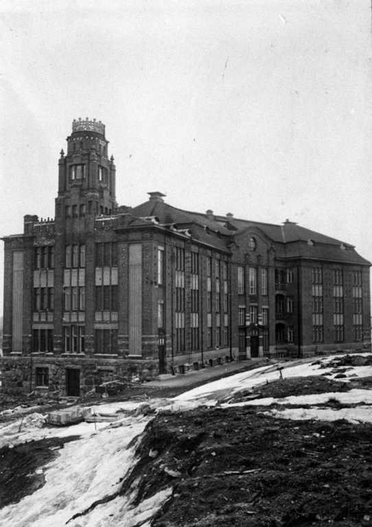 Helsingin yliopiston fysiikan laitos; Siltavuorenpenger 20; Helsinki